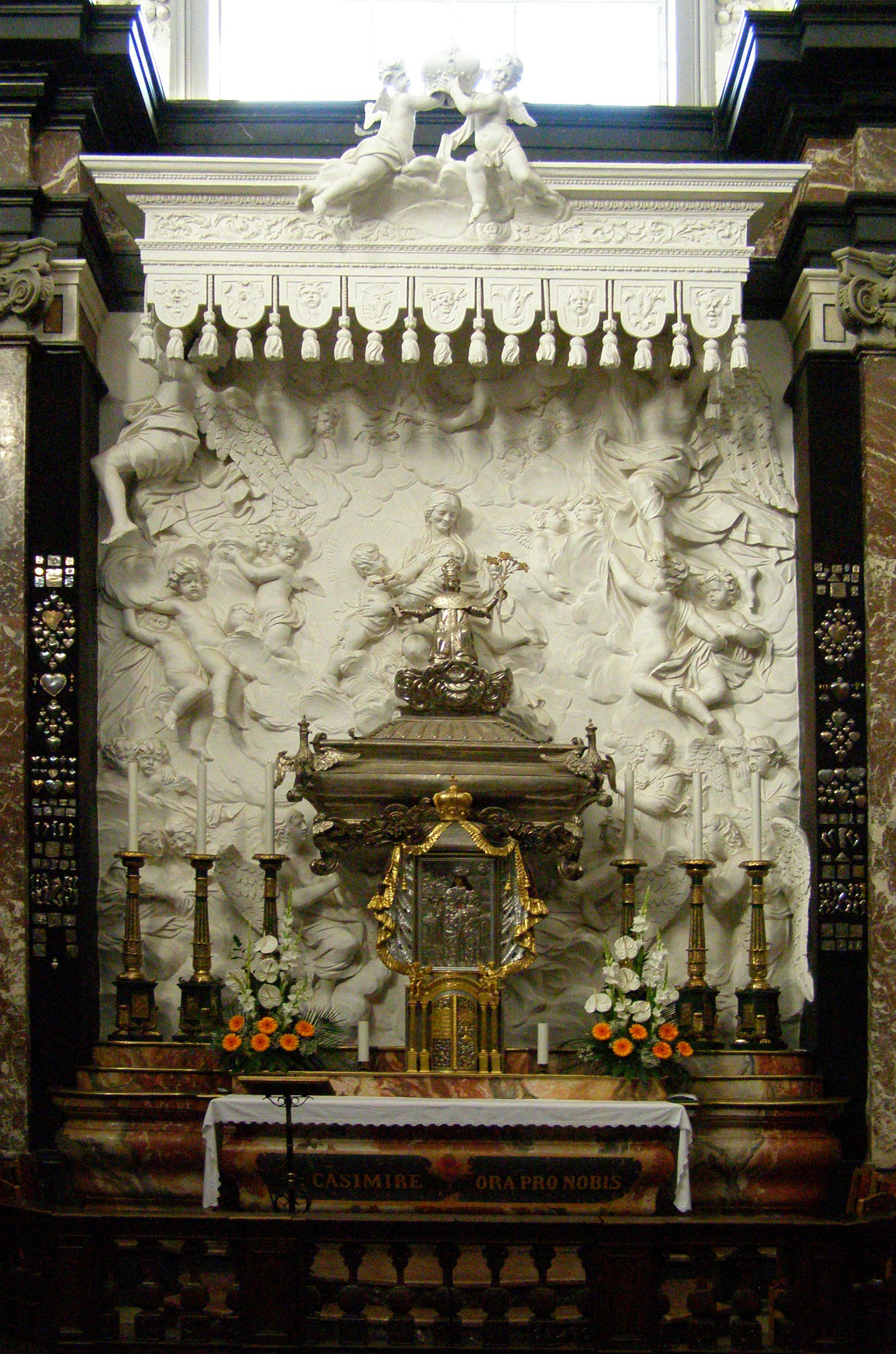 Relikwiarz św. Kazimierza w kaplicy katedry wileńskiej